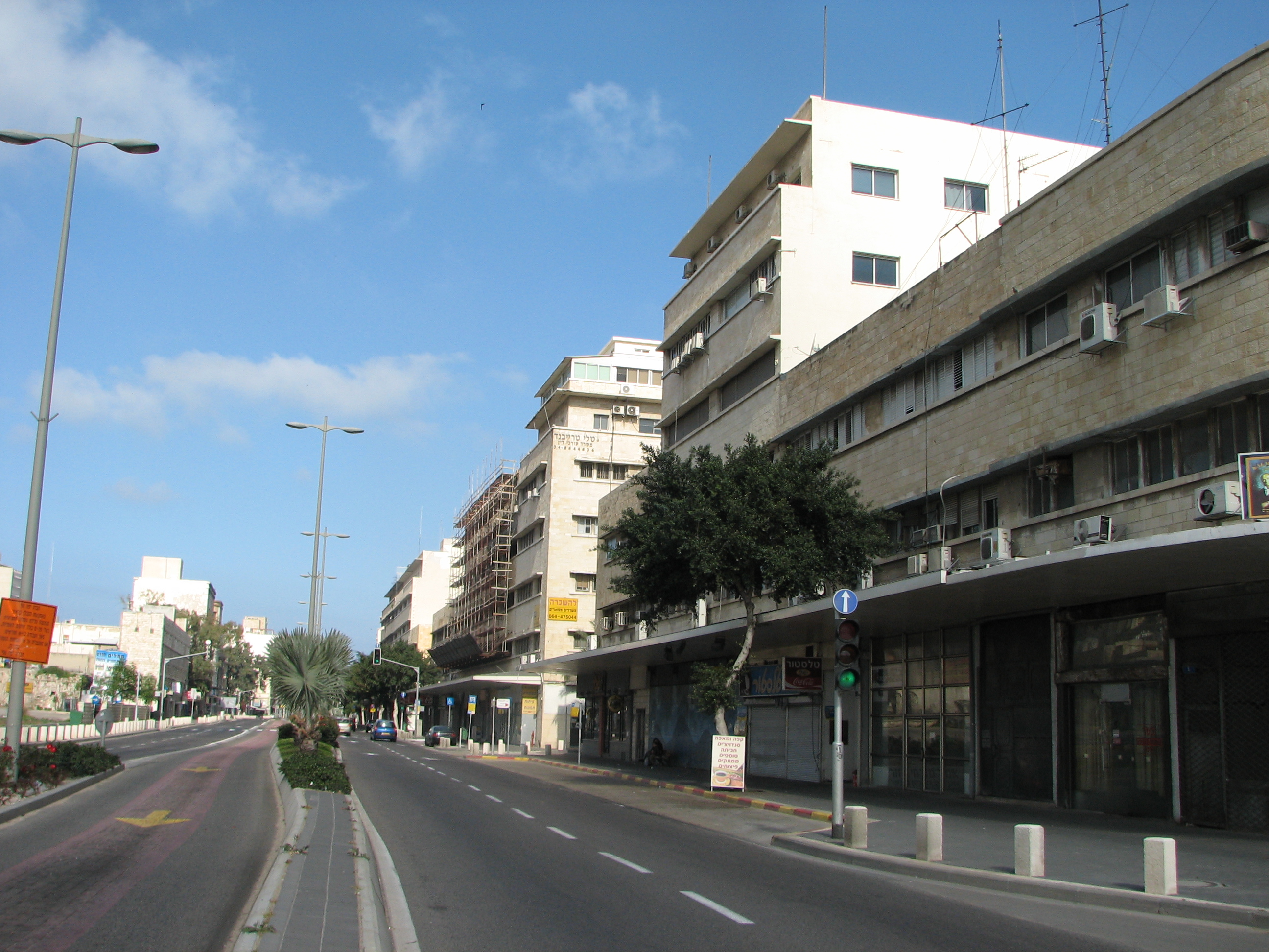 Ha'atzma'ut street , Downtown Haifa רחוב העצמאות בעיר התחתית בחיפה, מבט לכיוו מערב